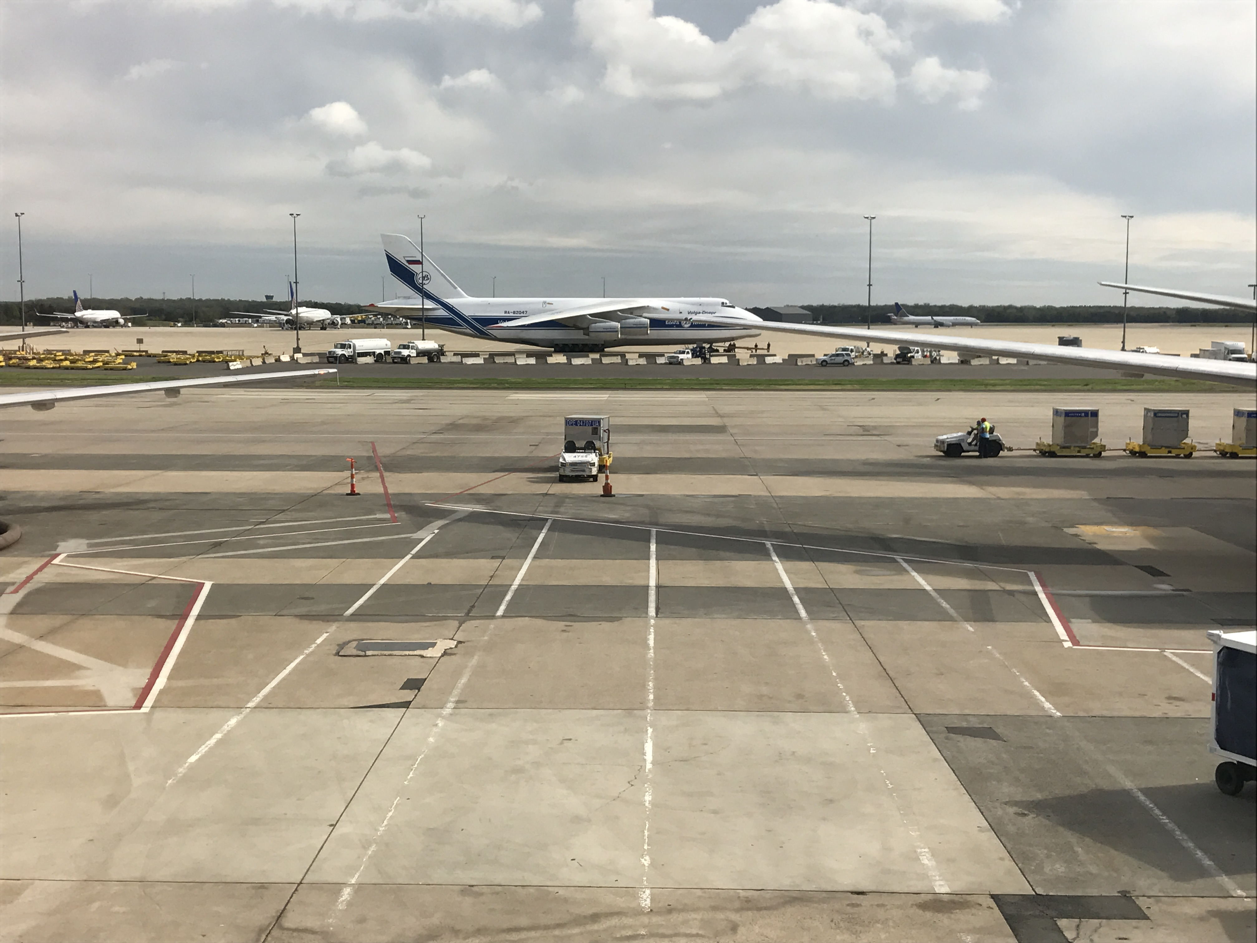 Antonov An-124 en el Aeropuerto de Washington Dulles.